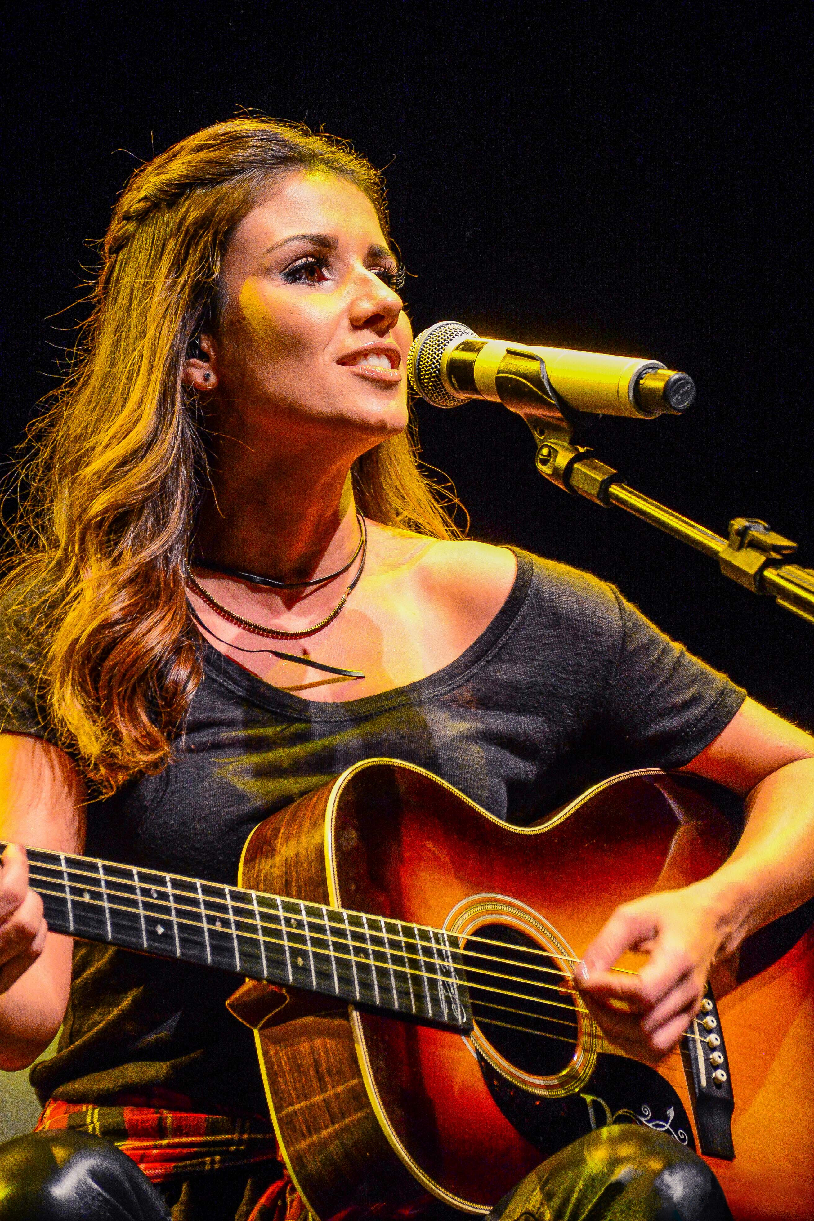 Paula Fernandes ao vivo 2017